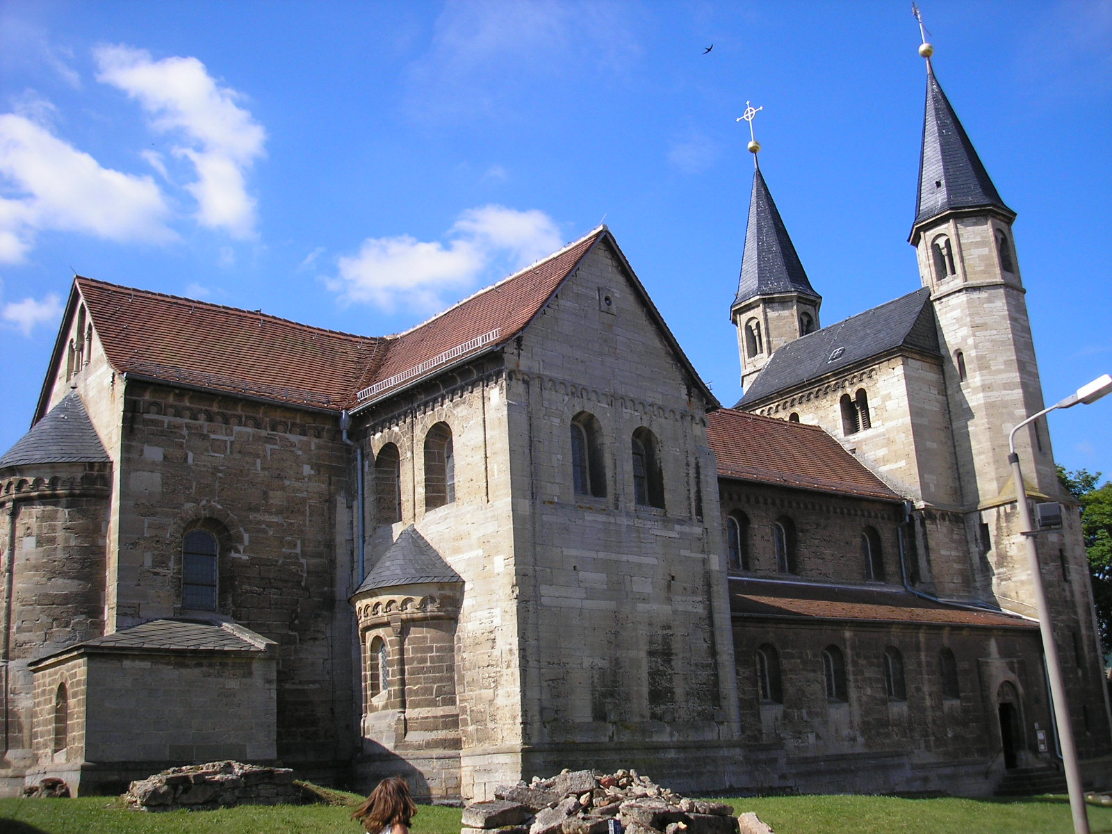 Klosterkirche Münchenlohra (Thüringen).